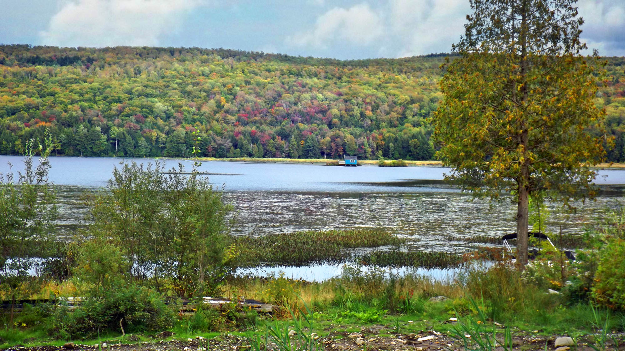 Etang du lac Brompton